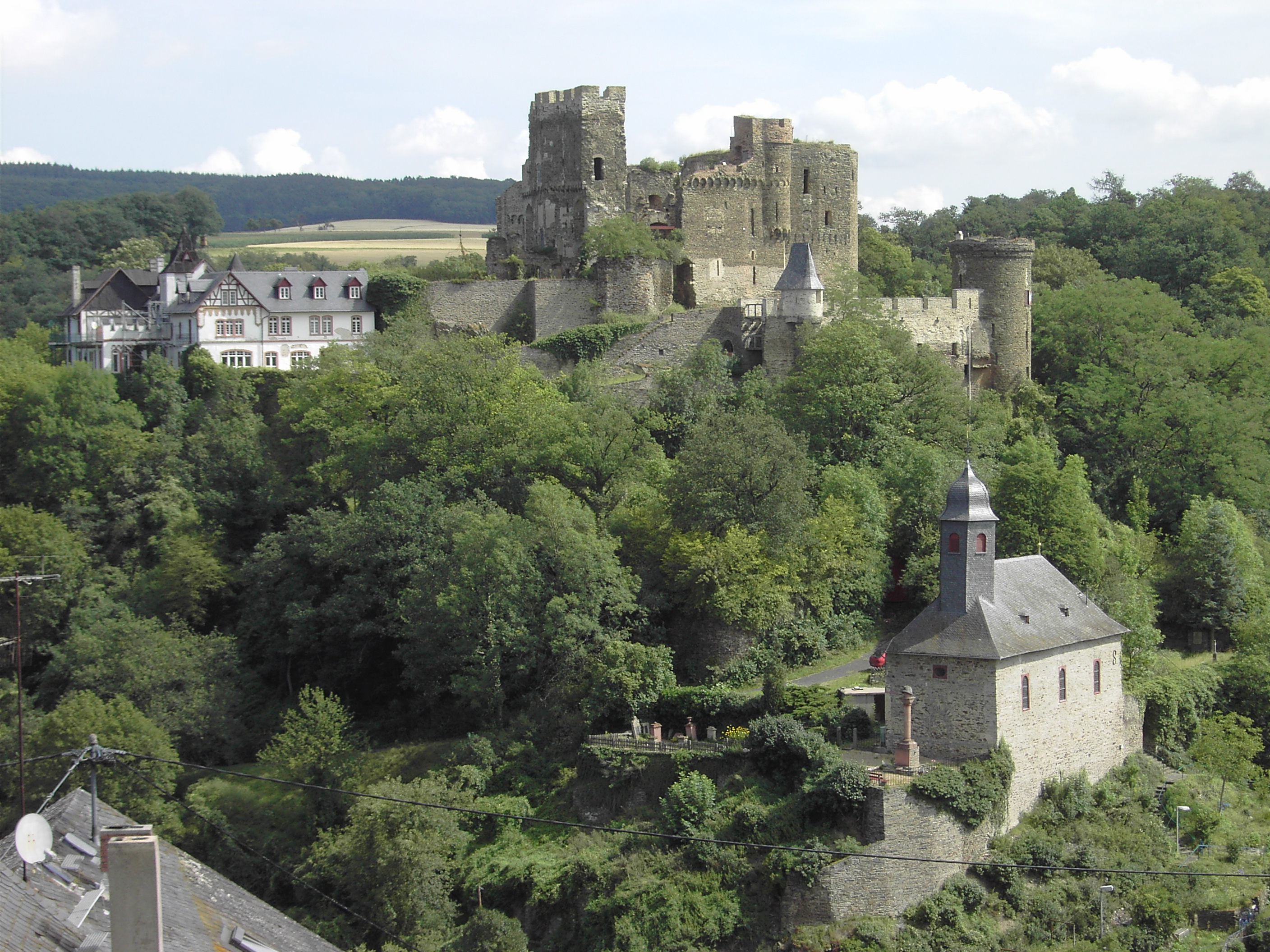 Bild der Burg Reichenberg und des Burgberges mit der BurgkapelleRechts die Burgruine, links das historisierende Wohngebäude von 1880,im Vordergrund die Burgkapelle, heute Ev. Kirche, um die Kirche das Ehrenmal, der Burgfriedhof und der Friedhof der Pächter von Hof Offenthal